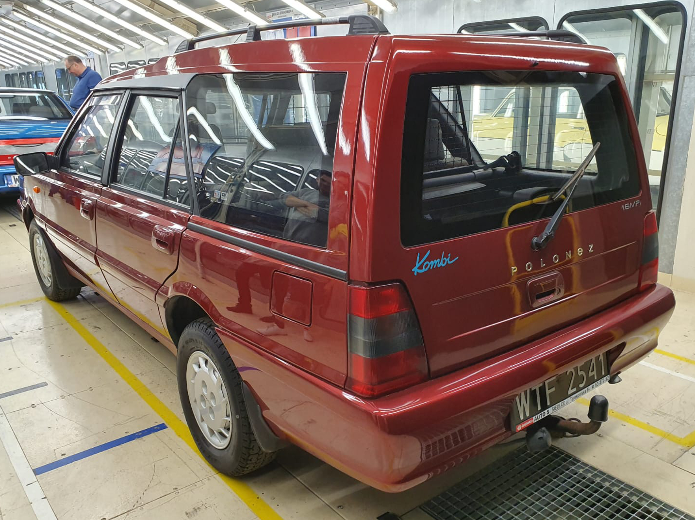 Daewoo-FSO Polonez Kombi w muzeum w FSO.